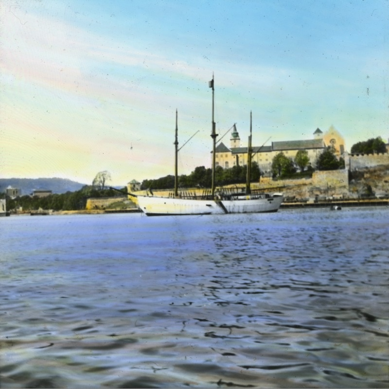 Håndkolorert dias. Maud 1918. Sverdrup Ekspedisjon 1918. Maud ligger fortøyd utenfor Akershus festning. Maud er en norsk polarskute bygd hos Chr. Jensen i Vollen i Asker som ekspedisjonsskip for Roald Amundsens polarferd nord for Sibir 1918–25. Harald Ulrik Sverdrup ledet det vitenskapelige arbeidet under ekspedisjon.